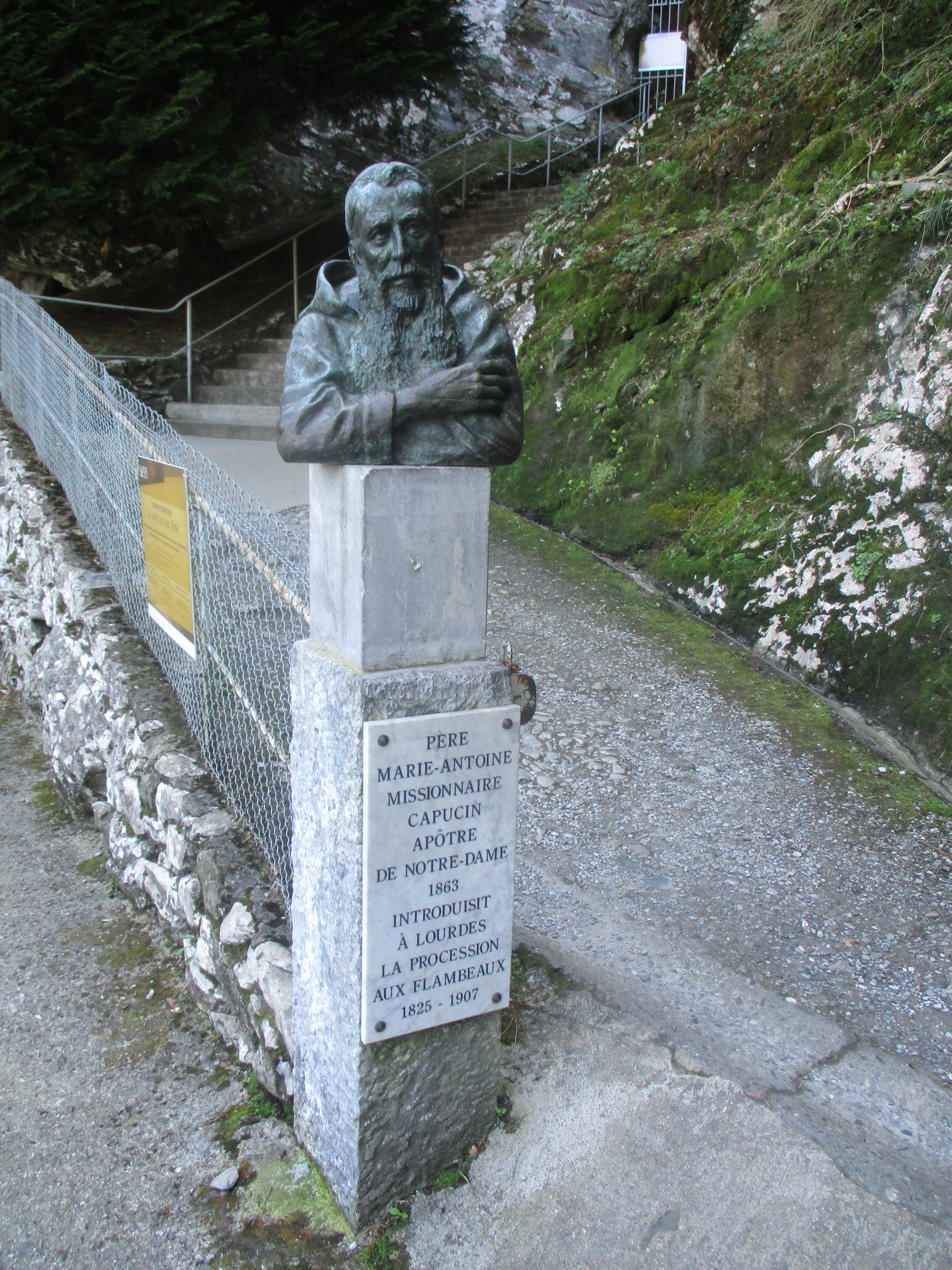 Buste du Père Marie-Antoine de Lavaur, capucin (1825-1907), à Lourdes.